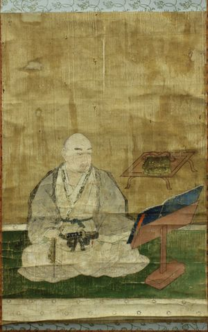 樺山忠助の肖像画。